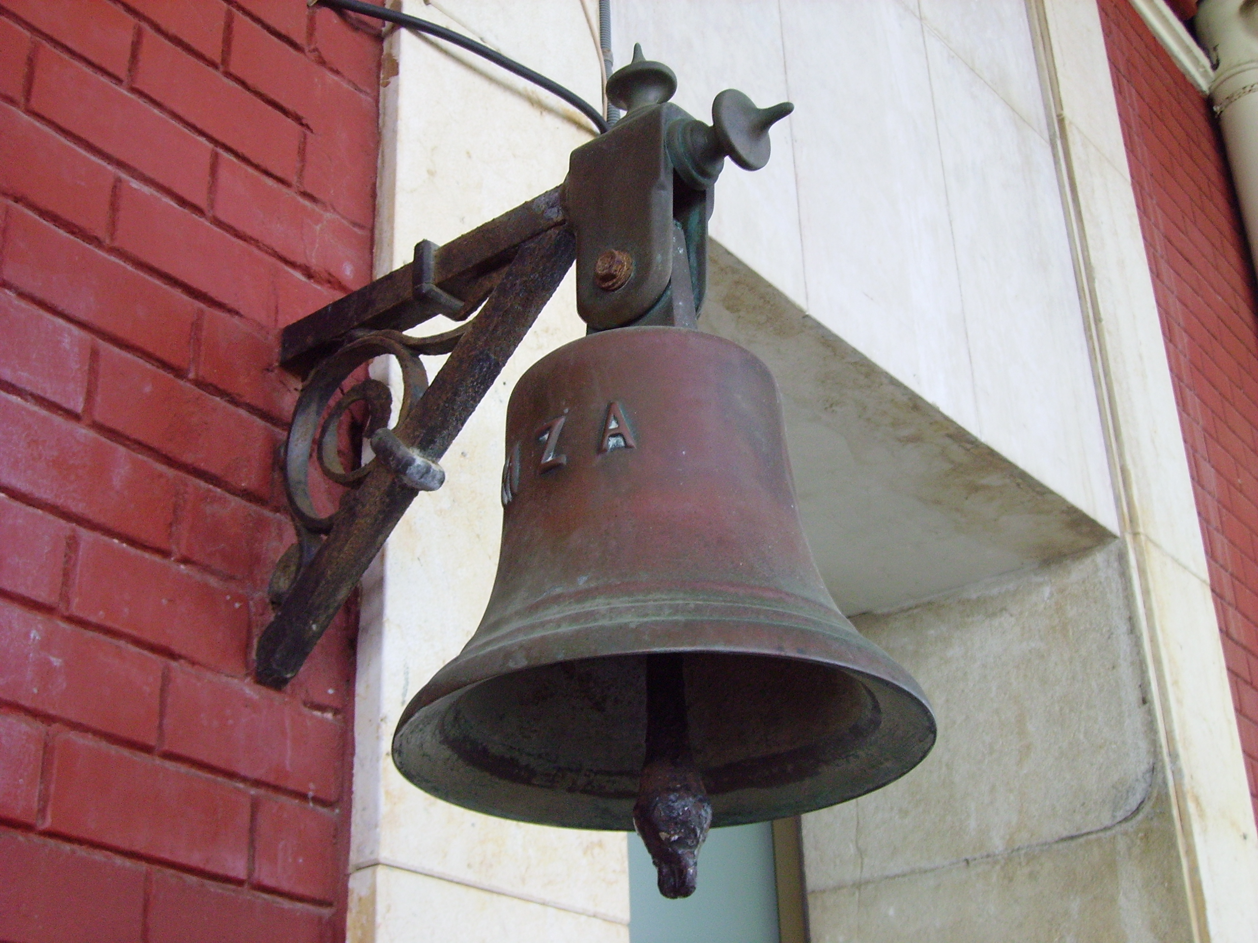 Campana MZA a l'Estació de Mataró, Maresme, Catalunya.